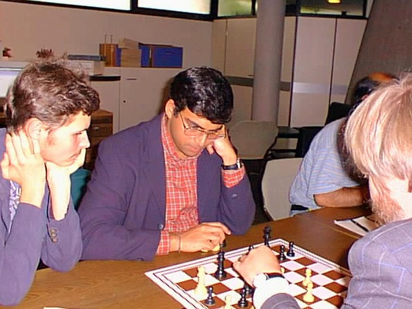 Peter Leko, Viswanathan Anand und Artur Jussupow, Dortmunder Schachtage 1997.